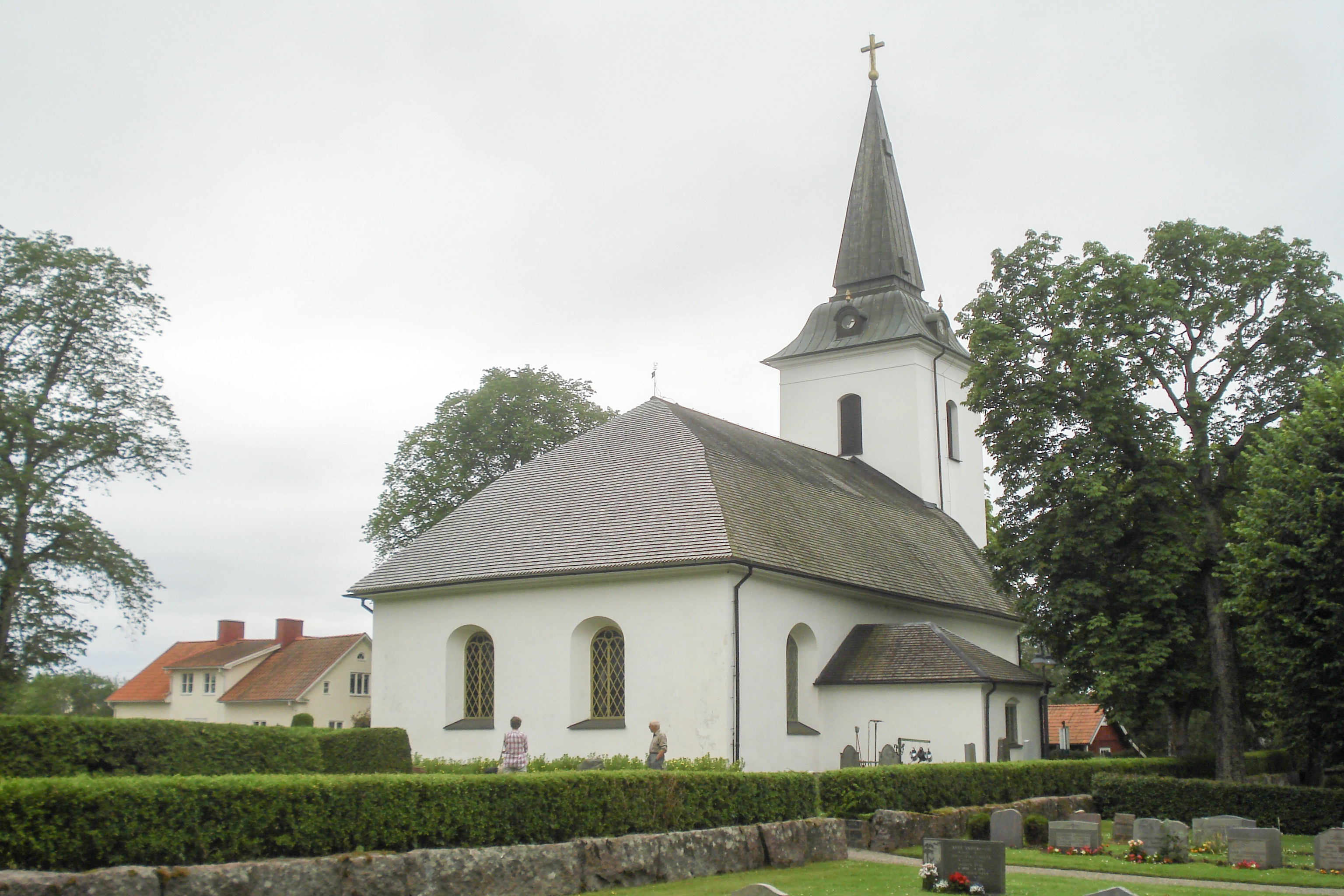 Sya kyrka, Mjölby kommun